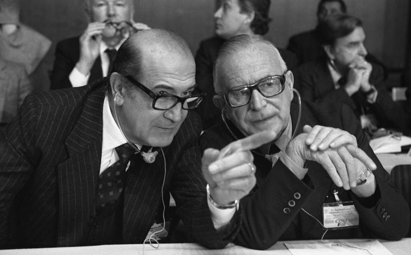 26. Bundesparteitag der CDU in der Friedrich-Ebert-Halle in Ludwigshafen 23.-25.10.1978